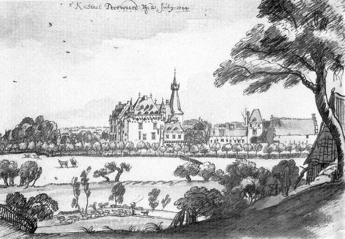 Jan de Beier. Kasteel Doorwerth. 1744. Afkomstig uit een brochure van het Het Nederlands Jachtmuseum Kasteel Doorwerth uit midden jaren '80.